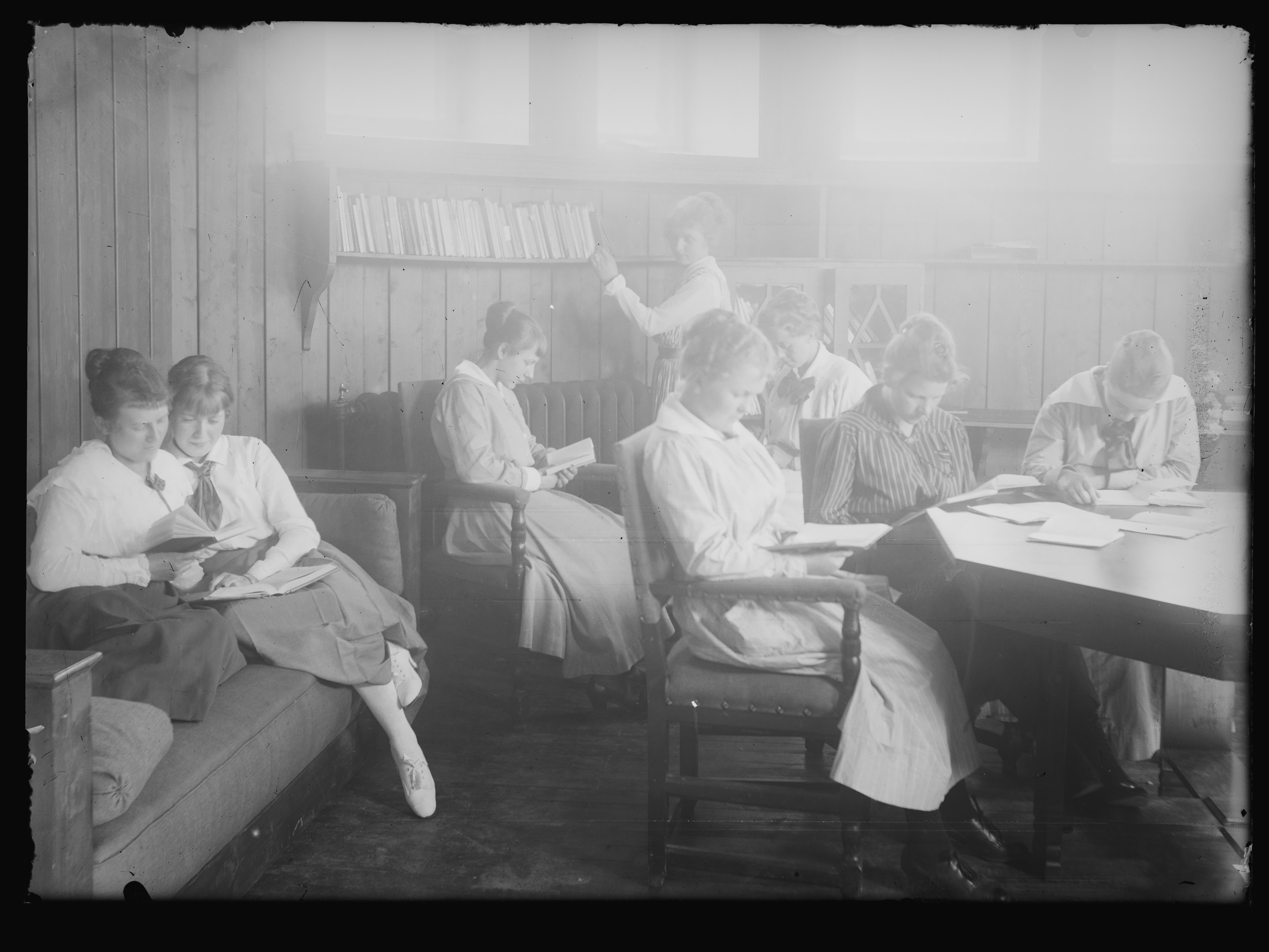 Bildet er hentet fra Nasjonalbibliotekets bildesamling. Anmerkninger til bildet var: Påskrift arkivark: Studenterhjemmet Gjetemyrsveien Arkivnummer: 243 St. Hanshaugen, Oslo, Oslo